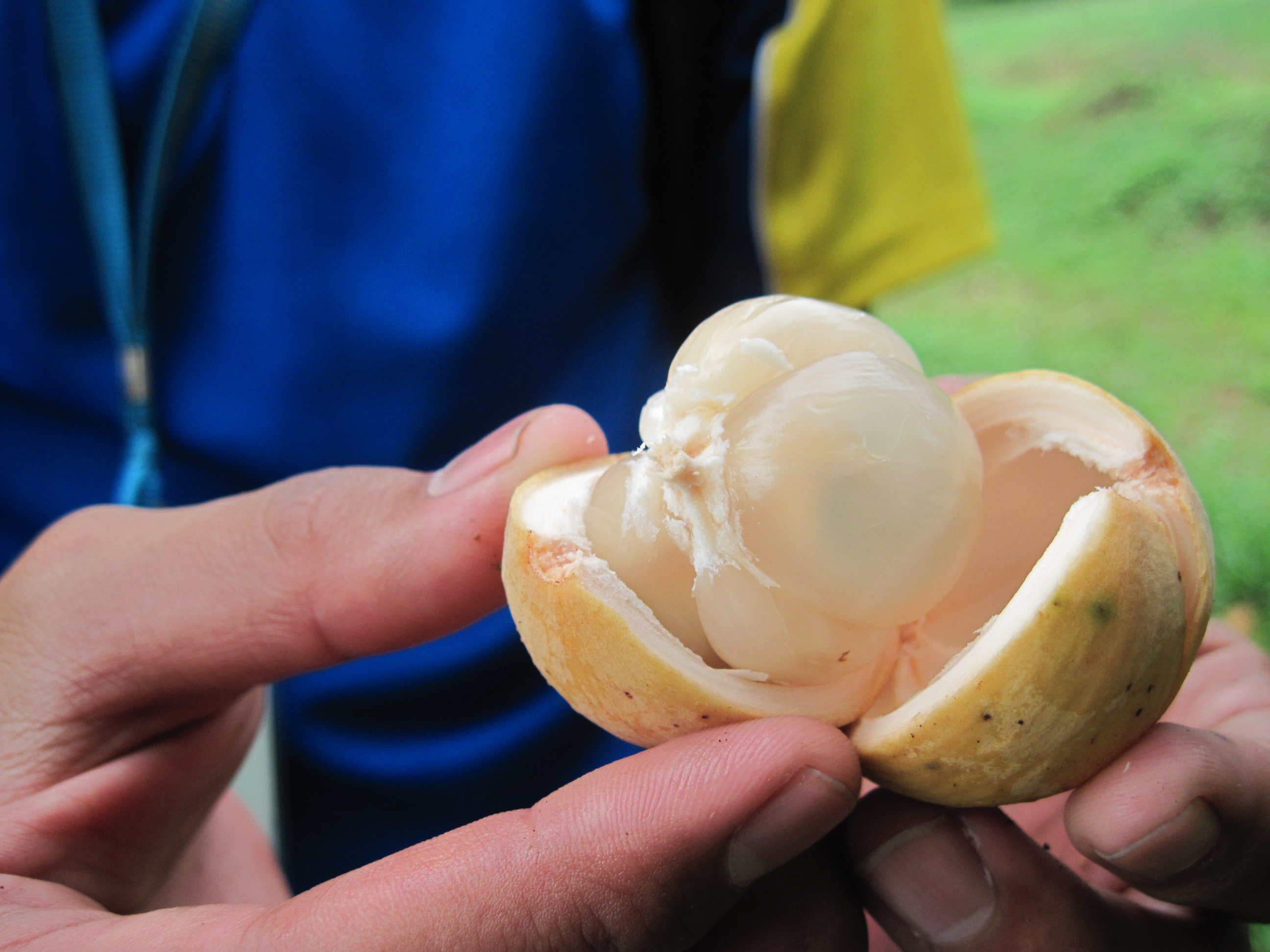 Isi duku langsat.